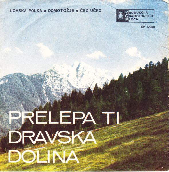 Ansambel Milana Vitka – Prelepa Ti Dravska Dolina.